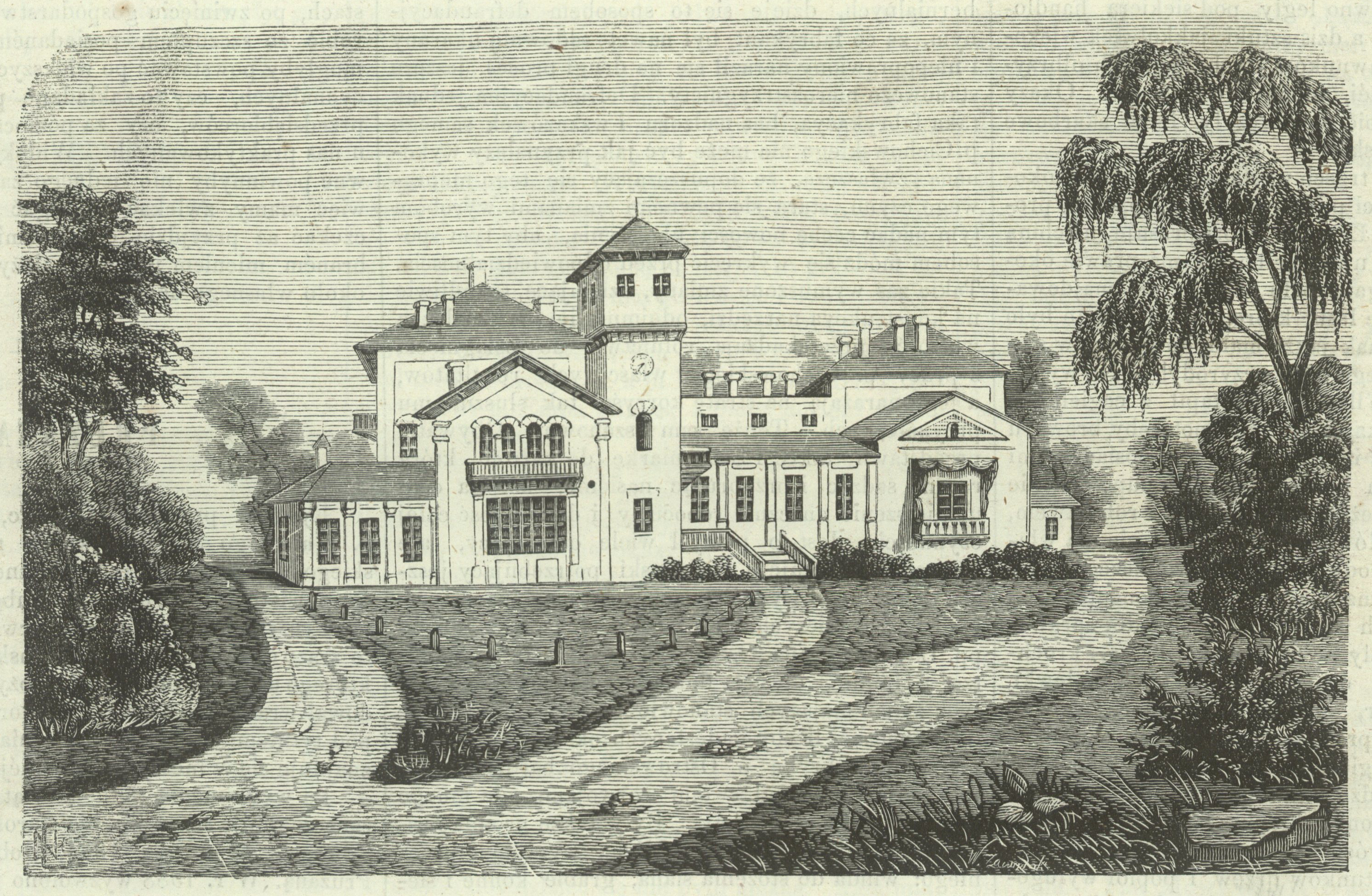 Беларуская (тарашкевіца): Пружаны (Pružany), палацык